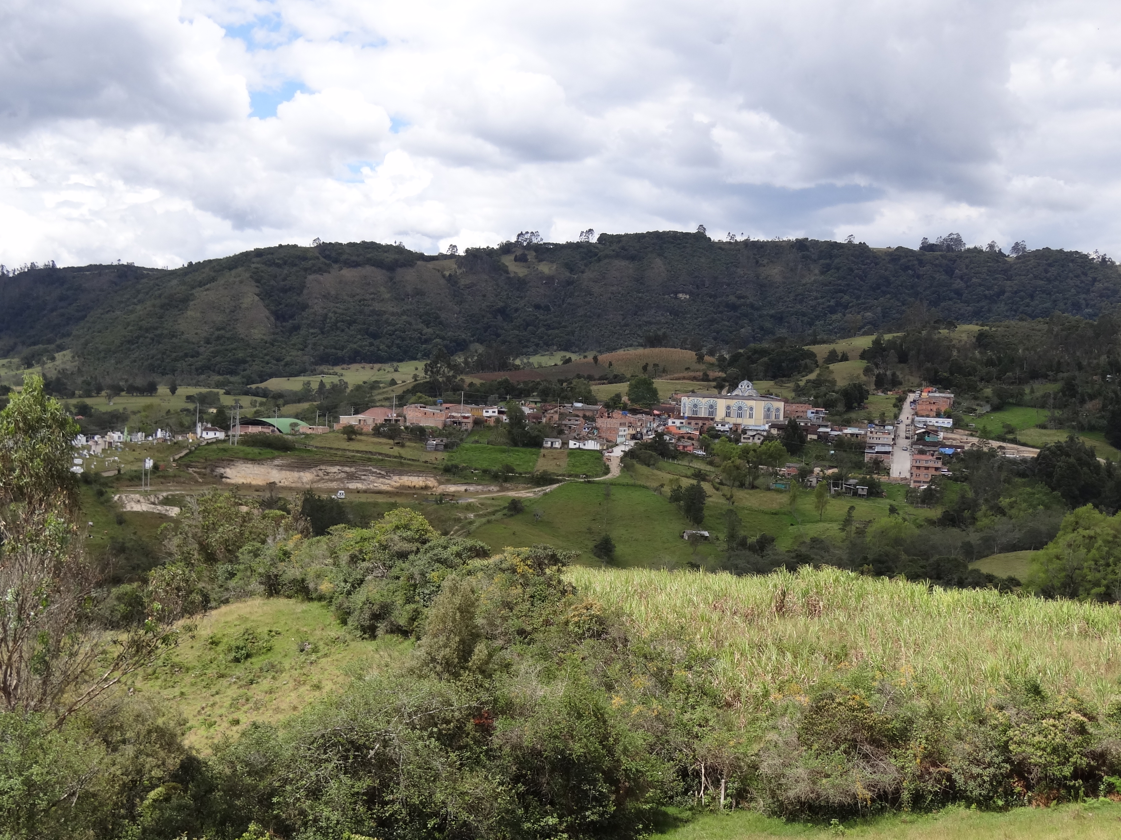 Panorámica del área urbana del municipio de Gachantivá, departamento de Boyacá, Colombia.